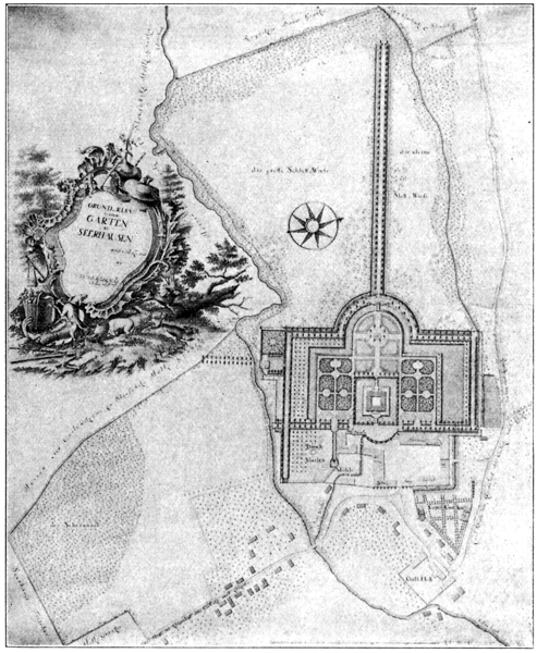 Schloss Seerhausen, Parkplan